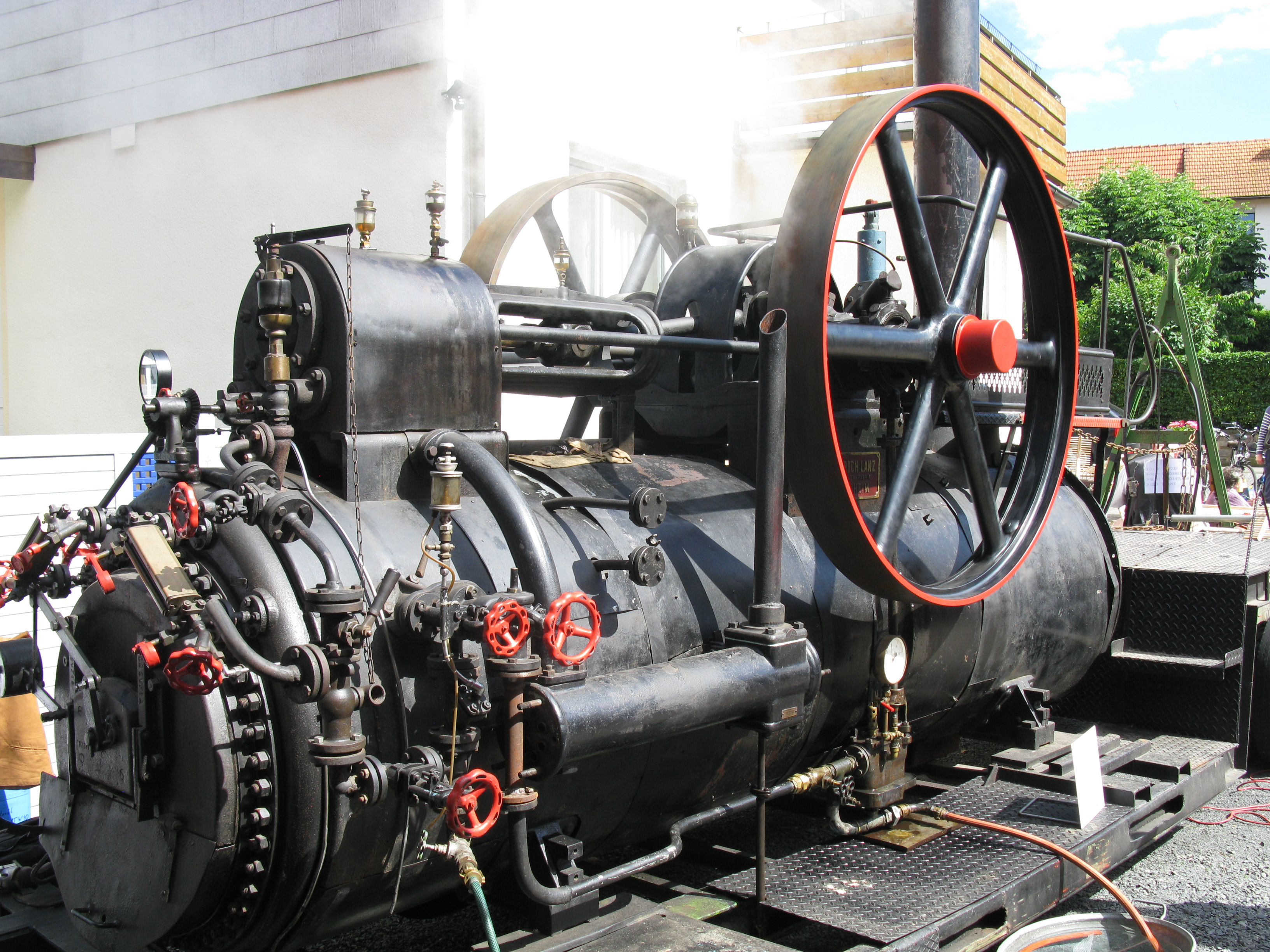 Die Dampfmaschine im Lebendigen Museum in Odershausen in Aktion